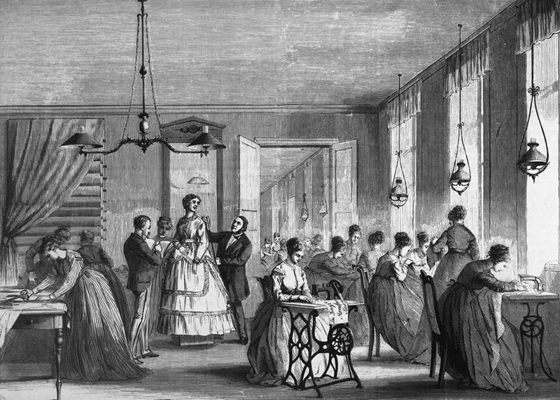 Jakobssons Modehandel, Stockholm, Norrmalm, kv. Loen, Drottninggatan 13. Syateljé. Ur Ny Illustrerad Tidning 1869.